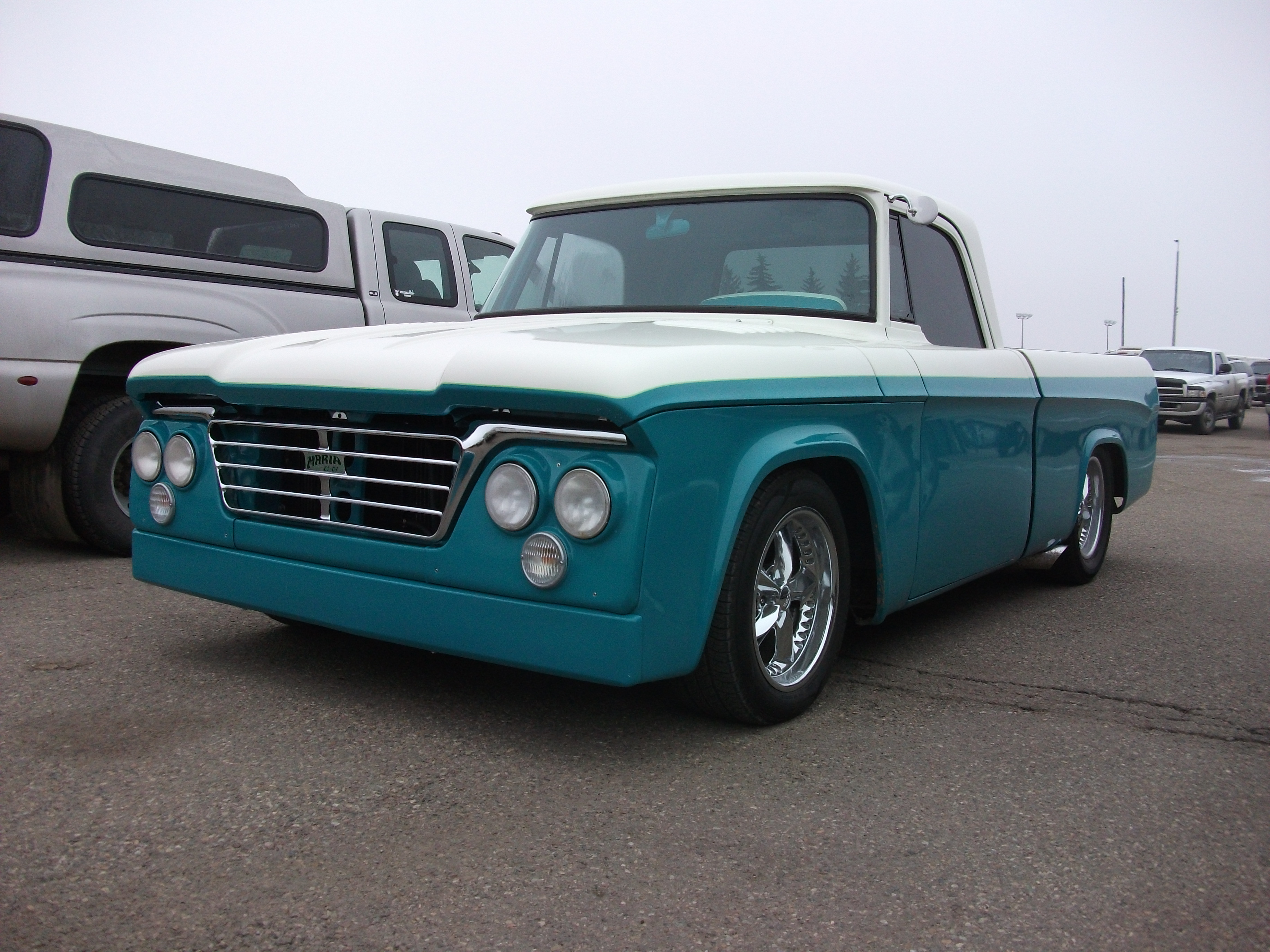 Dodge truck